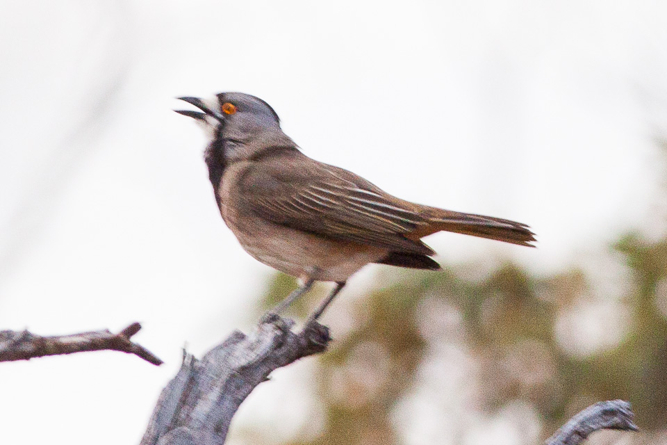 Crested Bellbird (Oreoica gutturalis)